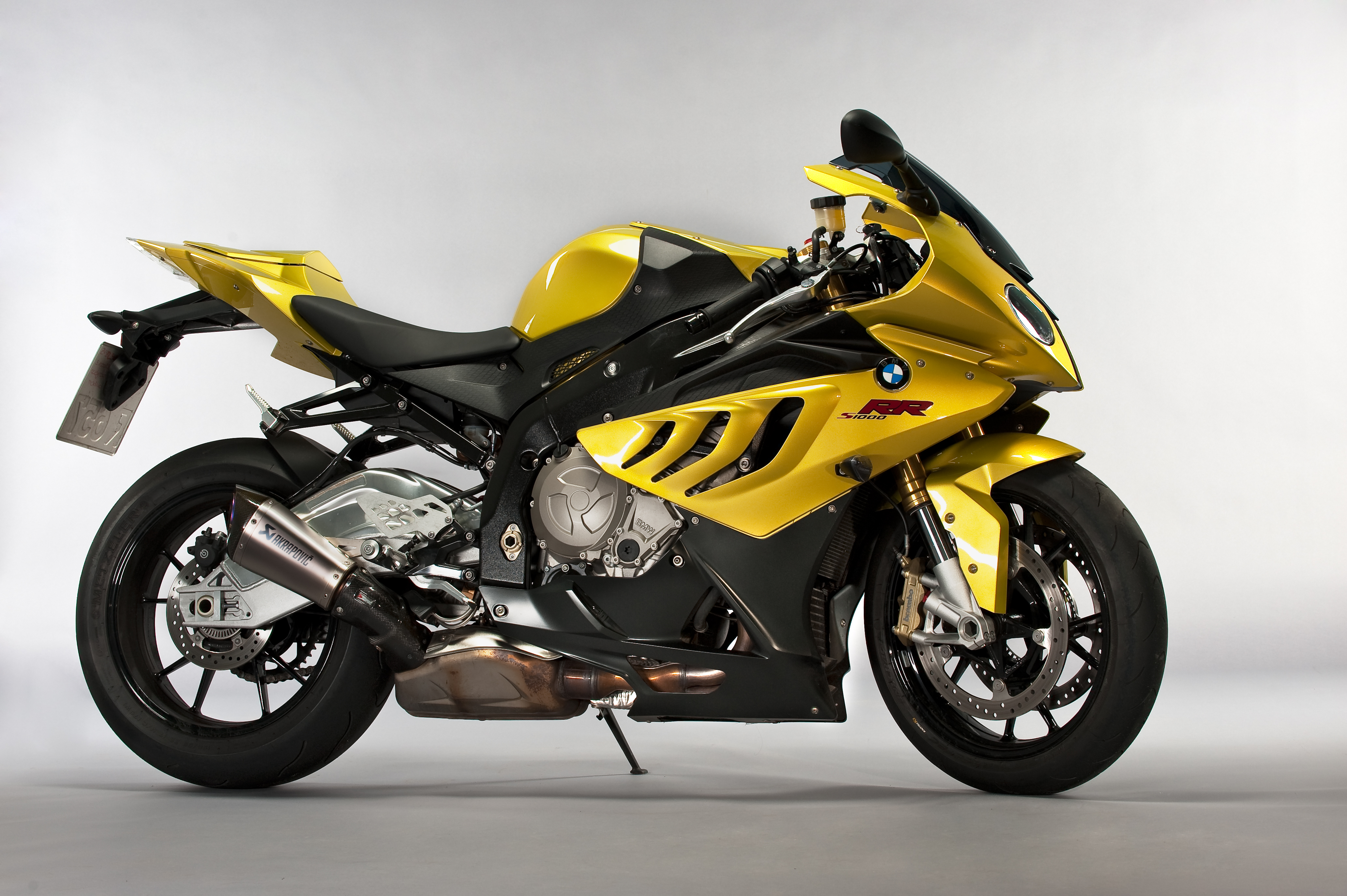 Supersport Motorrad BMW S1000RR, im Studio mit einem Striplight (von oben), einem Akzenttubus (auf das Vorderrad) und einer Lightbar (Mittebereich) ausgeleuchtet.